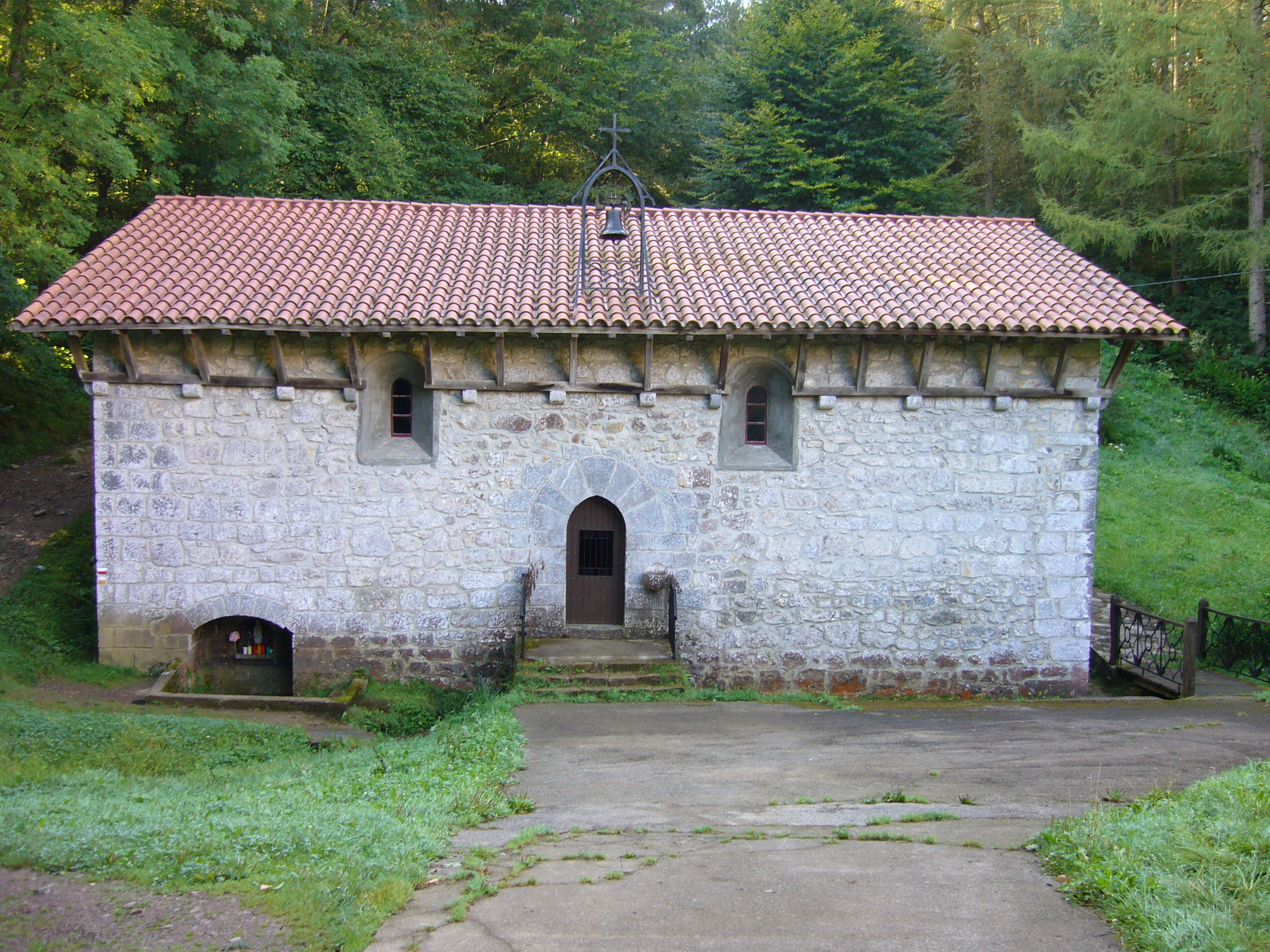 San Juan Iturriotz basaeliza